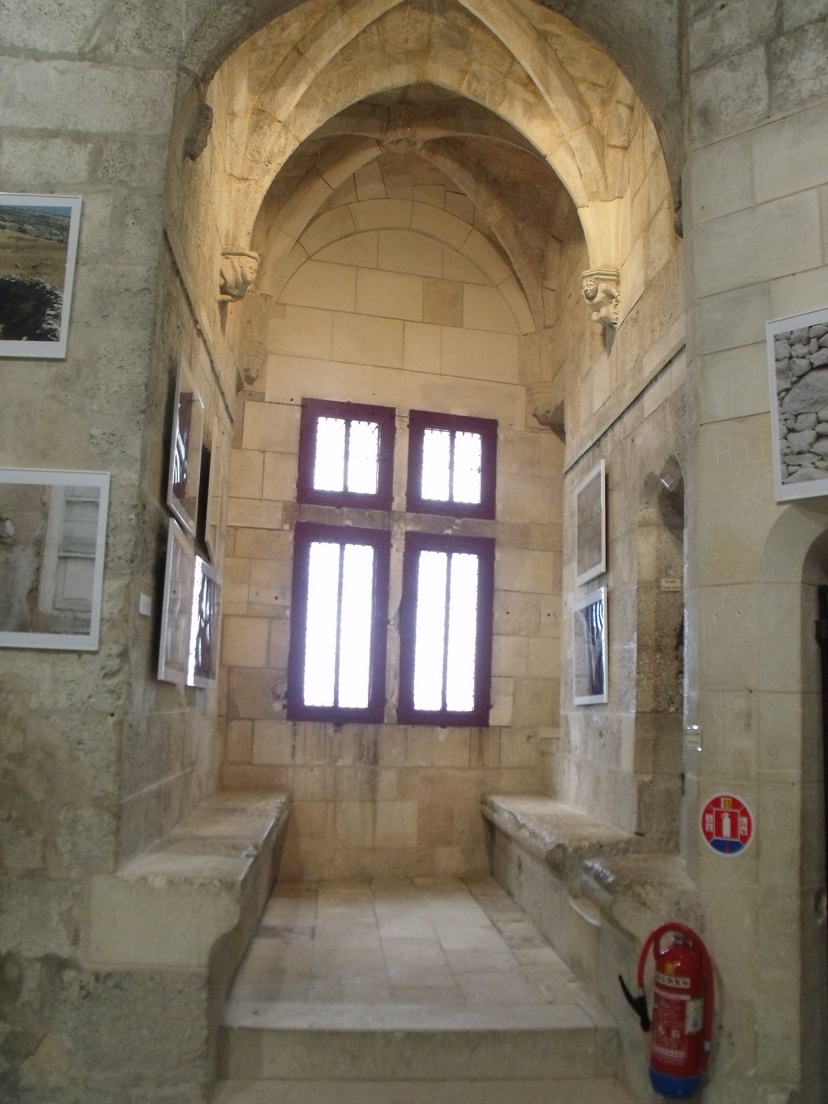 Torre de San Nicolás en La Rochela.